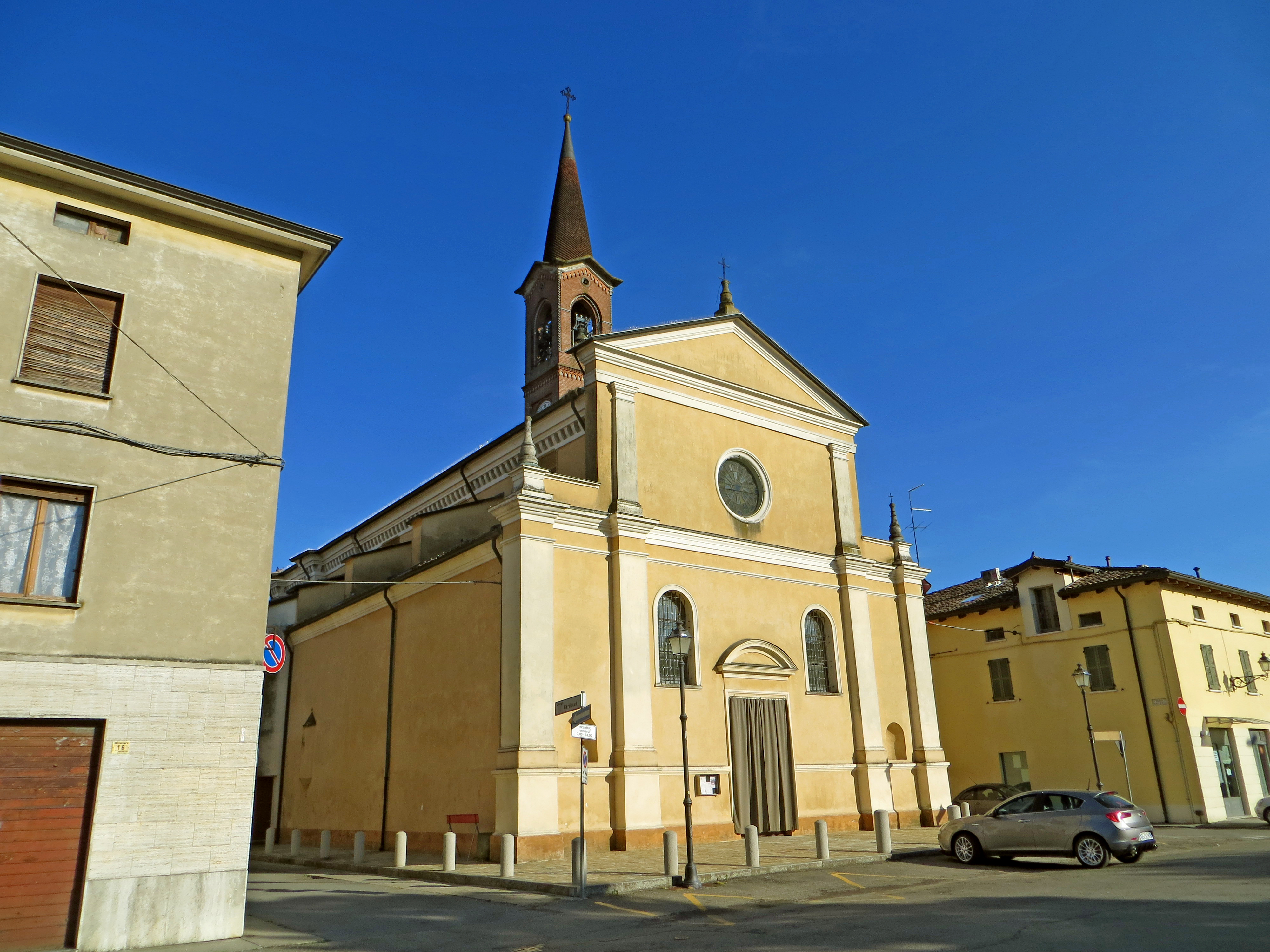 Chiesa dei Santi Bartolomeo e Michele (Roccabianca) - facciata e lato nord